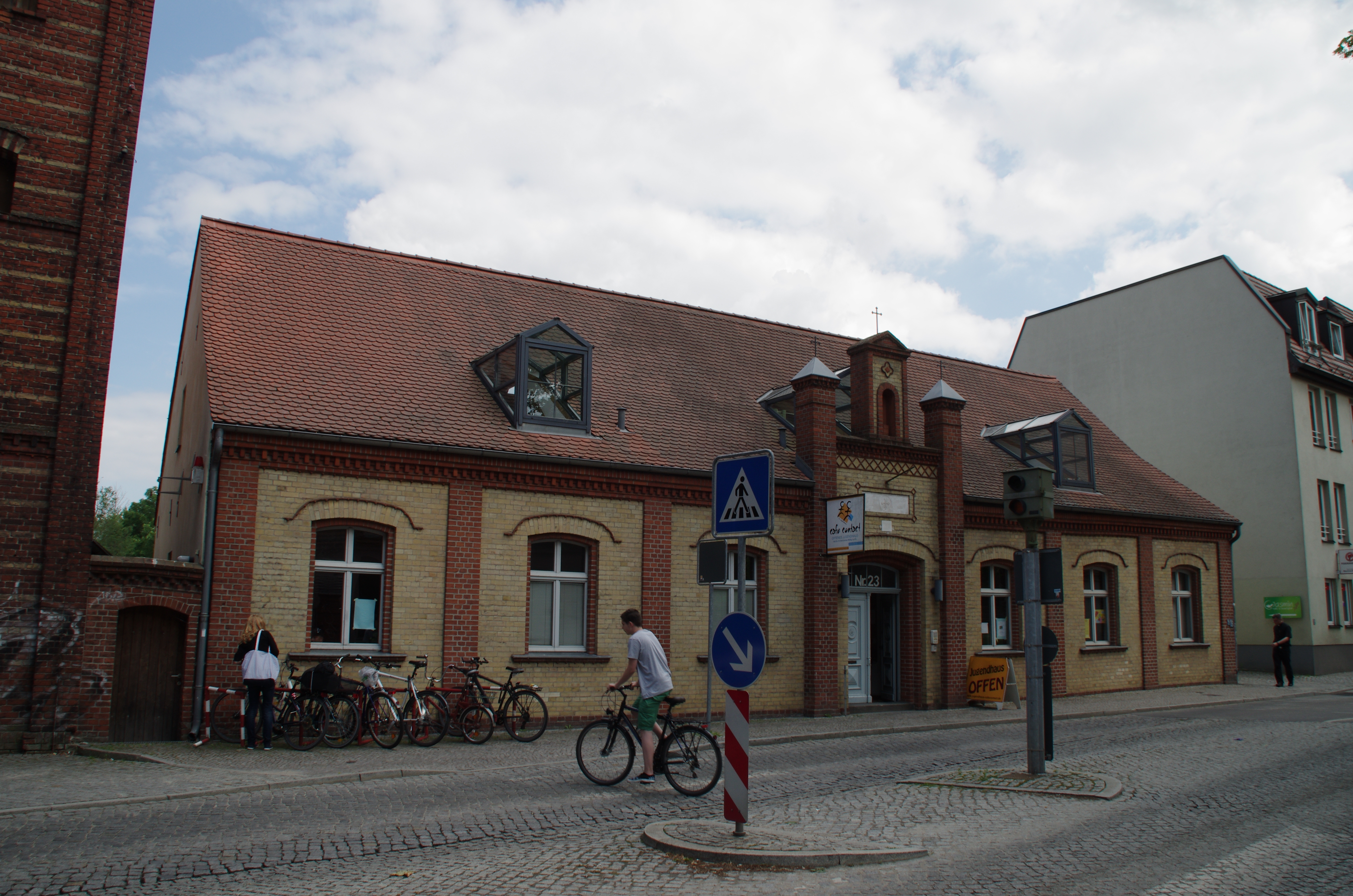 Brandenburg an der Havel in Brandenburg. Das Haus an der im Namen genannten Adresse steht unter Denkmalschutz.